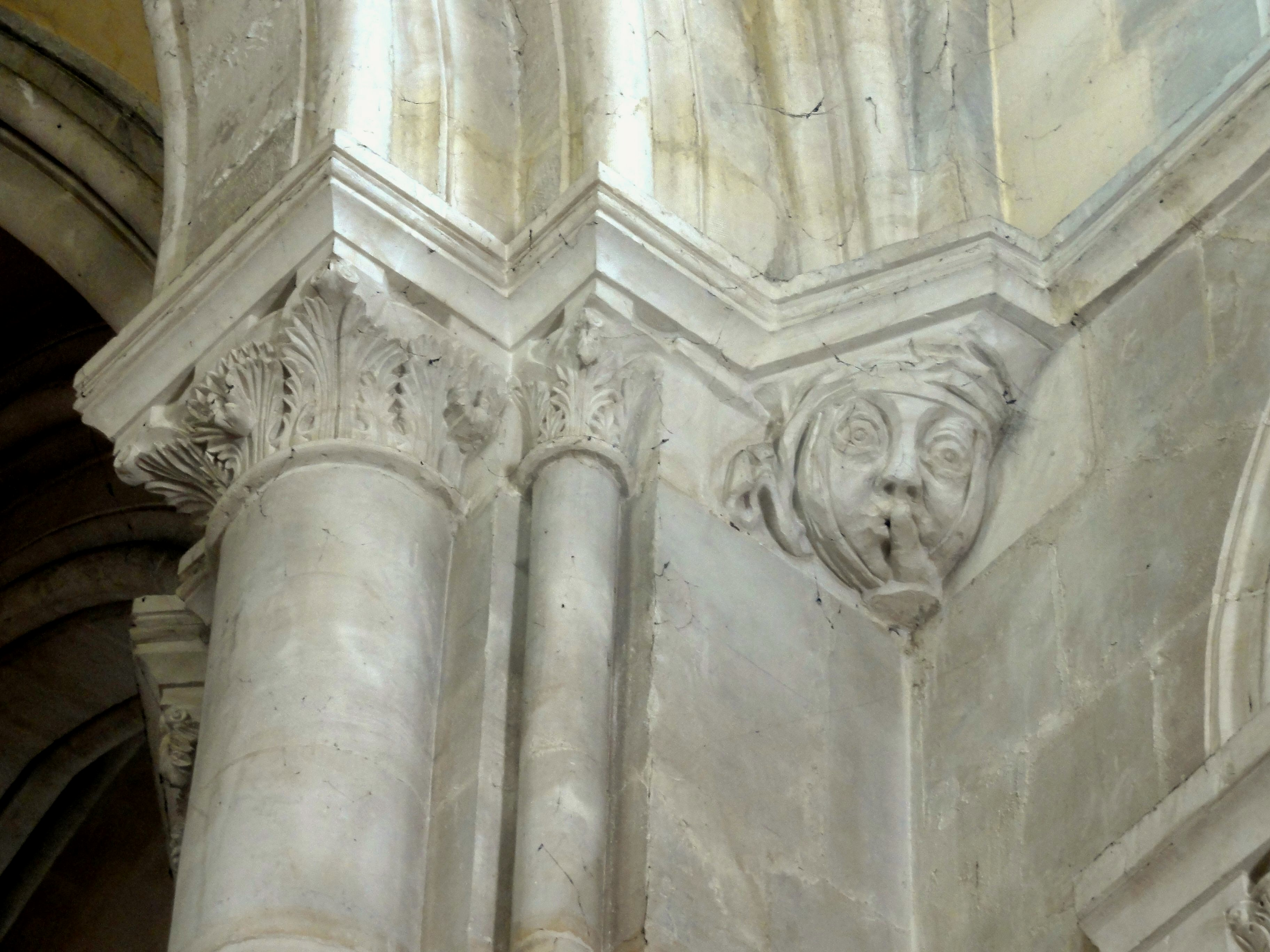 Croisée du transept, chapiteaux dans l'angle sud-ouest, côté nord-ouest.